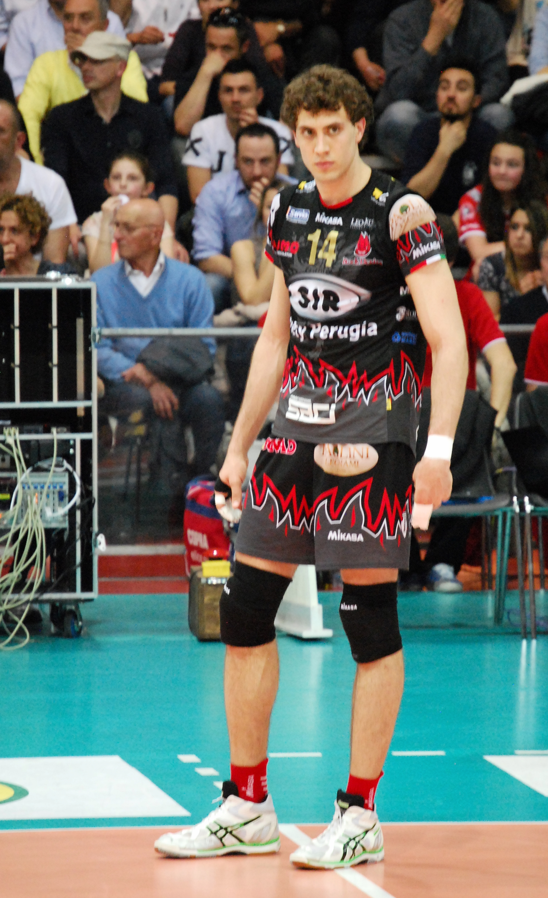 Aleksandar Atanasijevic